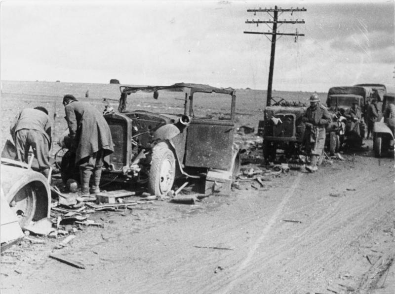 Die grosse Winterschlacht um Guadalajara Anfang März begann die grosse Offensive der nationalen Truppen auf Gudalajara, deren Hauptstoss auf der Strasse Madrid - Saragossa (Carretera de Aragon) geführt wurde. Die ausserordentlich schweren Kämpfe nahmen einen wechselnden Verlauf; das Kriegsglück, das sich im Anfang den Nationalen zuneigte, wandte sich später den Roten zu. Kälte, Hagelsturm, aufgeweichter Boden und scharfe Winde erwiesen sich oft als schlimmere Gegner als das feindliche Feuer. Die Soldaten der ersten beiden freiwilligen Divisionen lagen fünf Tage lang in Schlamm und Dreck, ohne warmes Essen. Zum ersten Male im spanischen Bürgerkrieg wurden ausschließlich motorisierte Einheiten eingesetzt. Hier hat eine Fliegerbombe in die Kolonne eingeschlagen und mehrere Wagen zerstört. Fot. H.G. von Studnitz